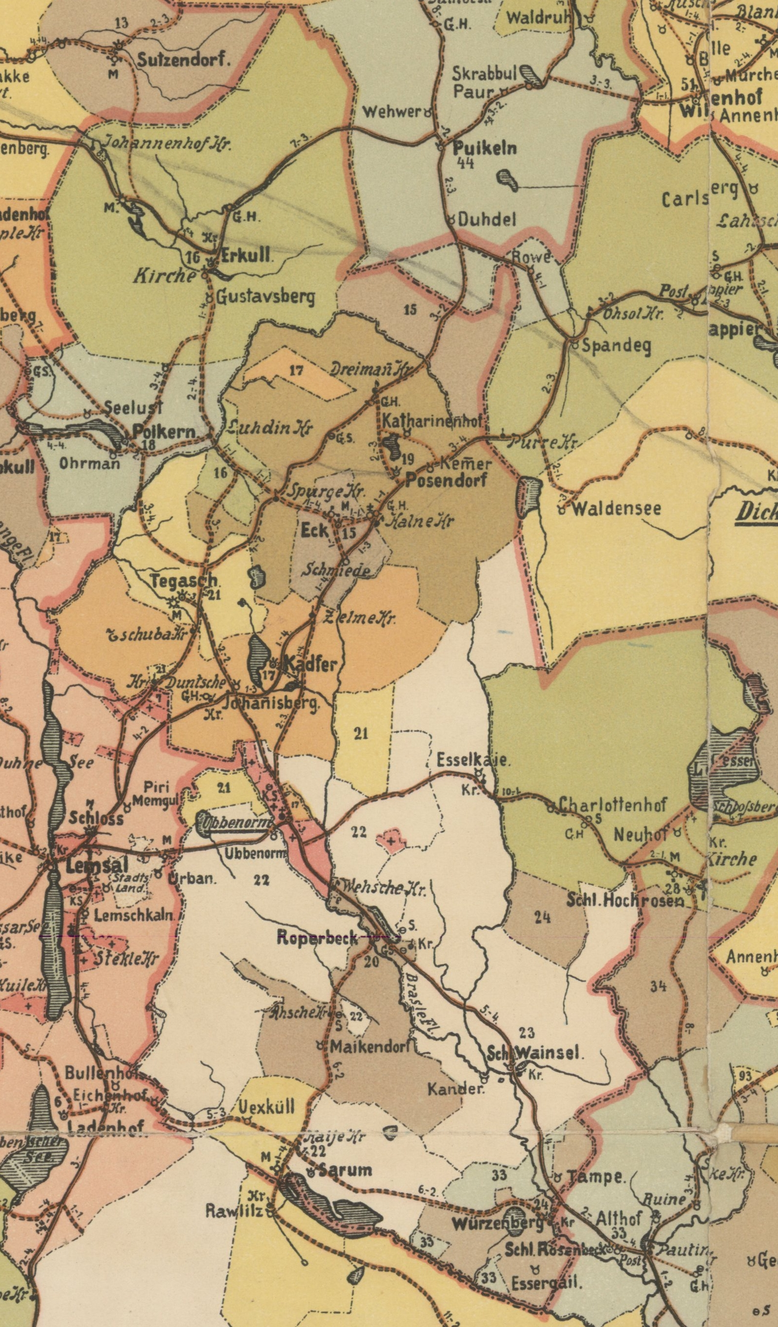 Umurga kihelkonna mõisad 1903. aasta kaardil.